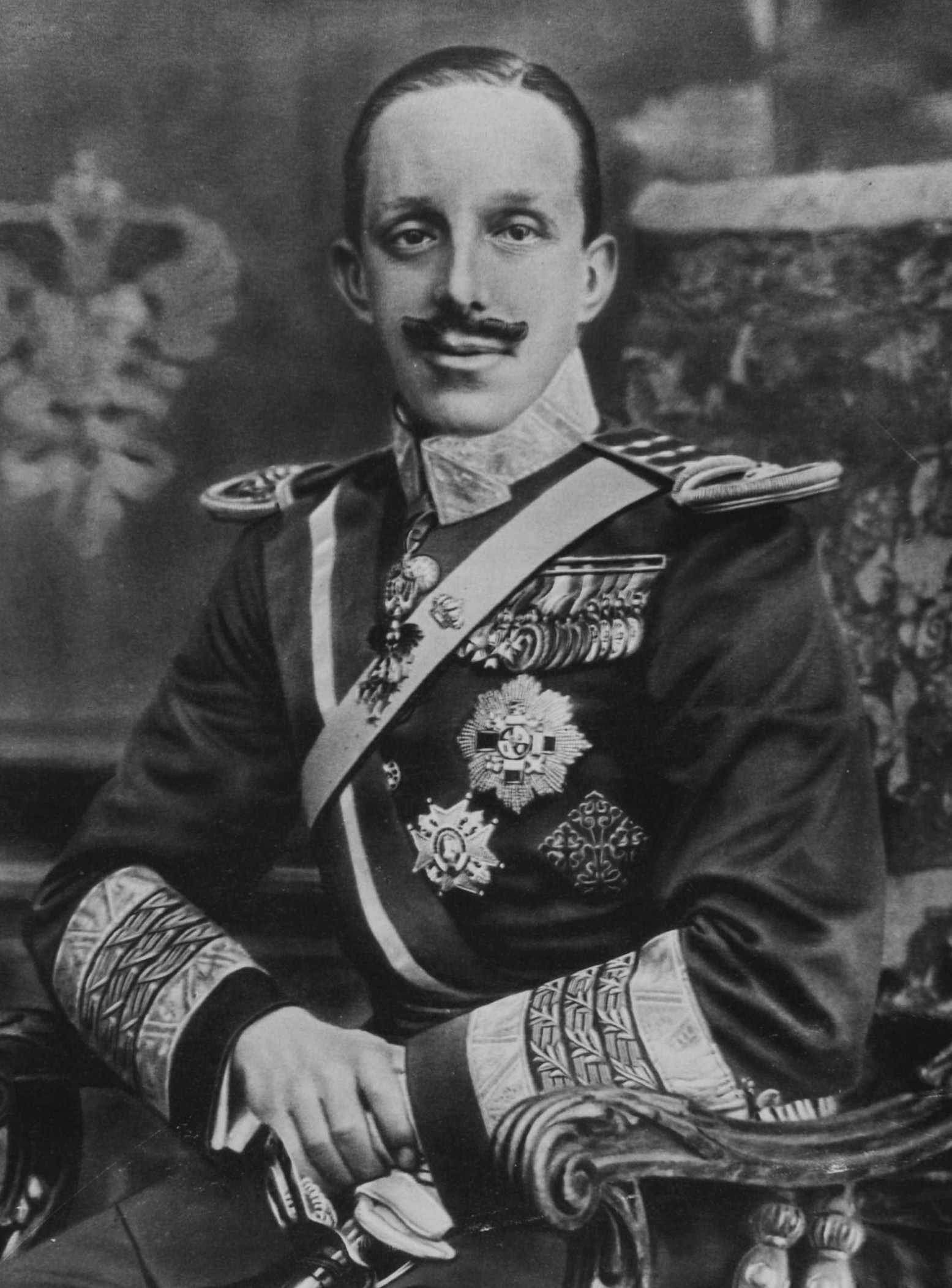 Alfonso XIII, rey de España, fotografiado por Kaulak.